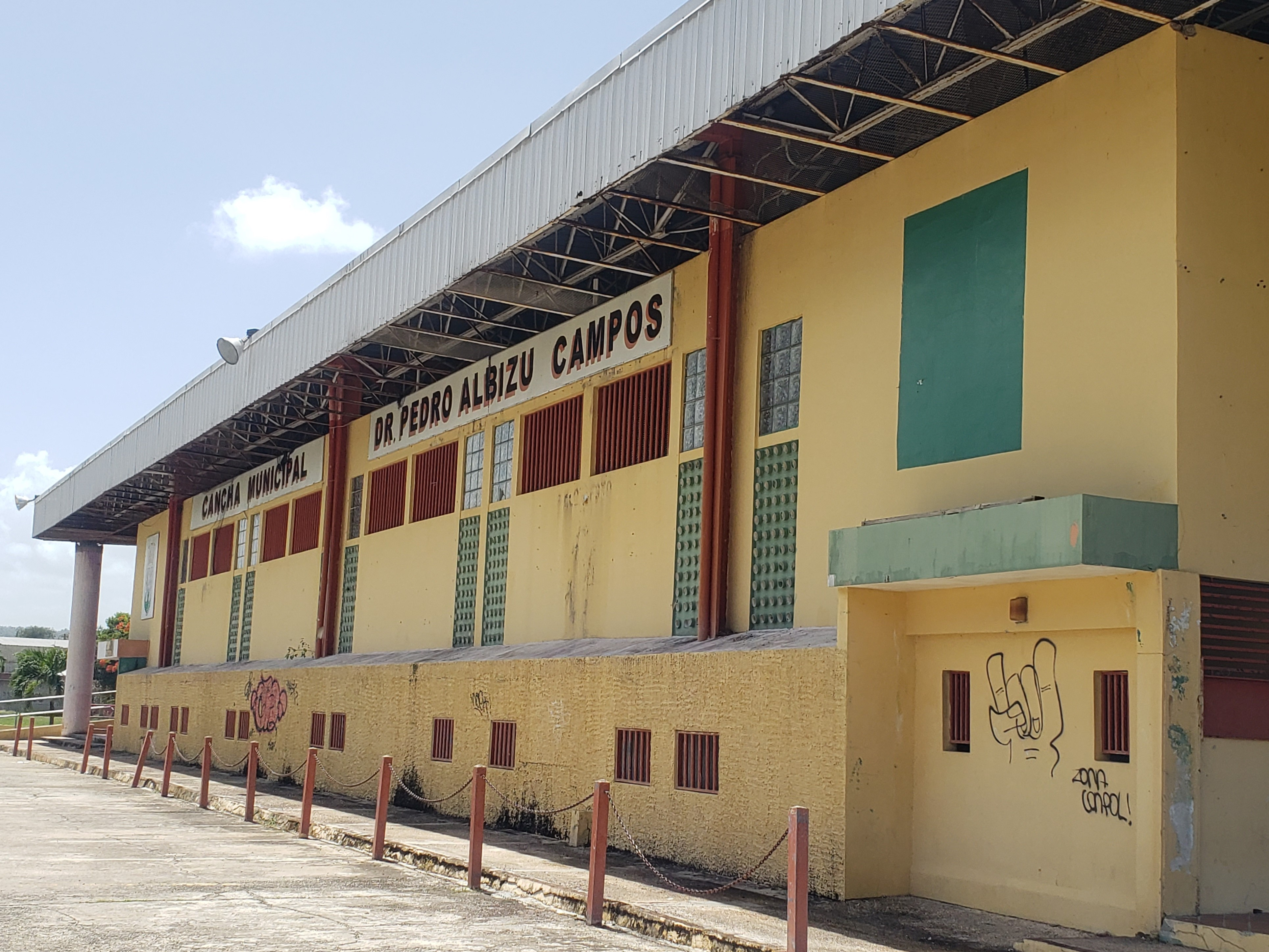 Cancha Dr. Pedro Albizu Campos en Yabucoa, Puerto Rico